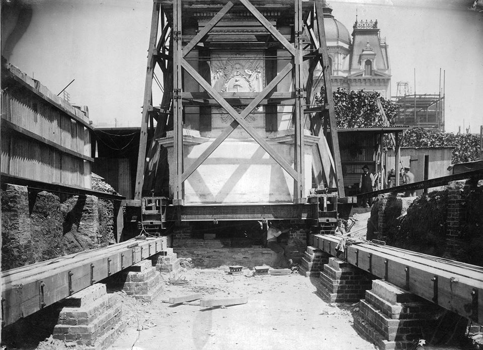 Traslado de la Pirámide de Mayo a su ubicación actual